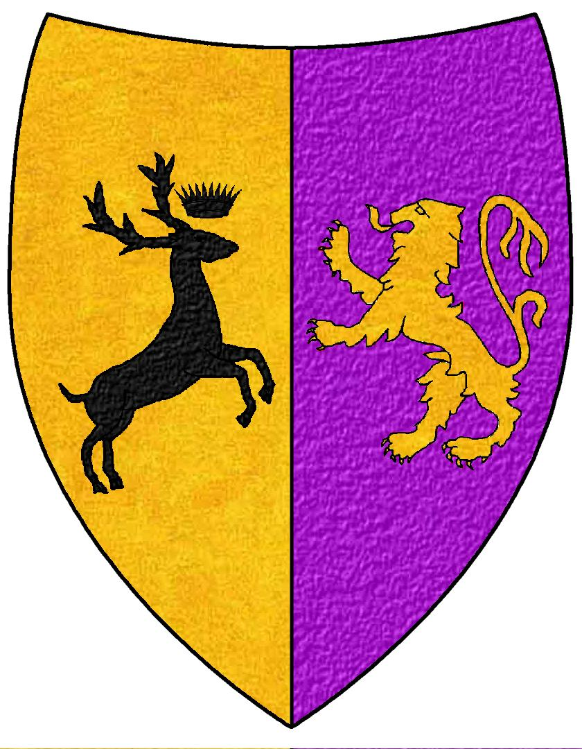 Stemma della casa Baratheon (re Thommen)